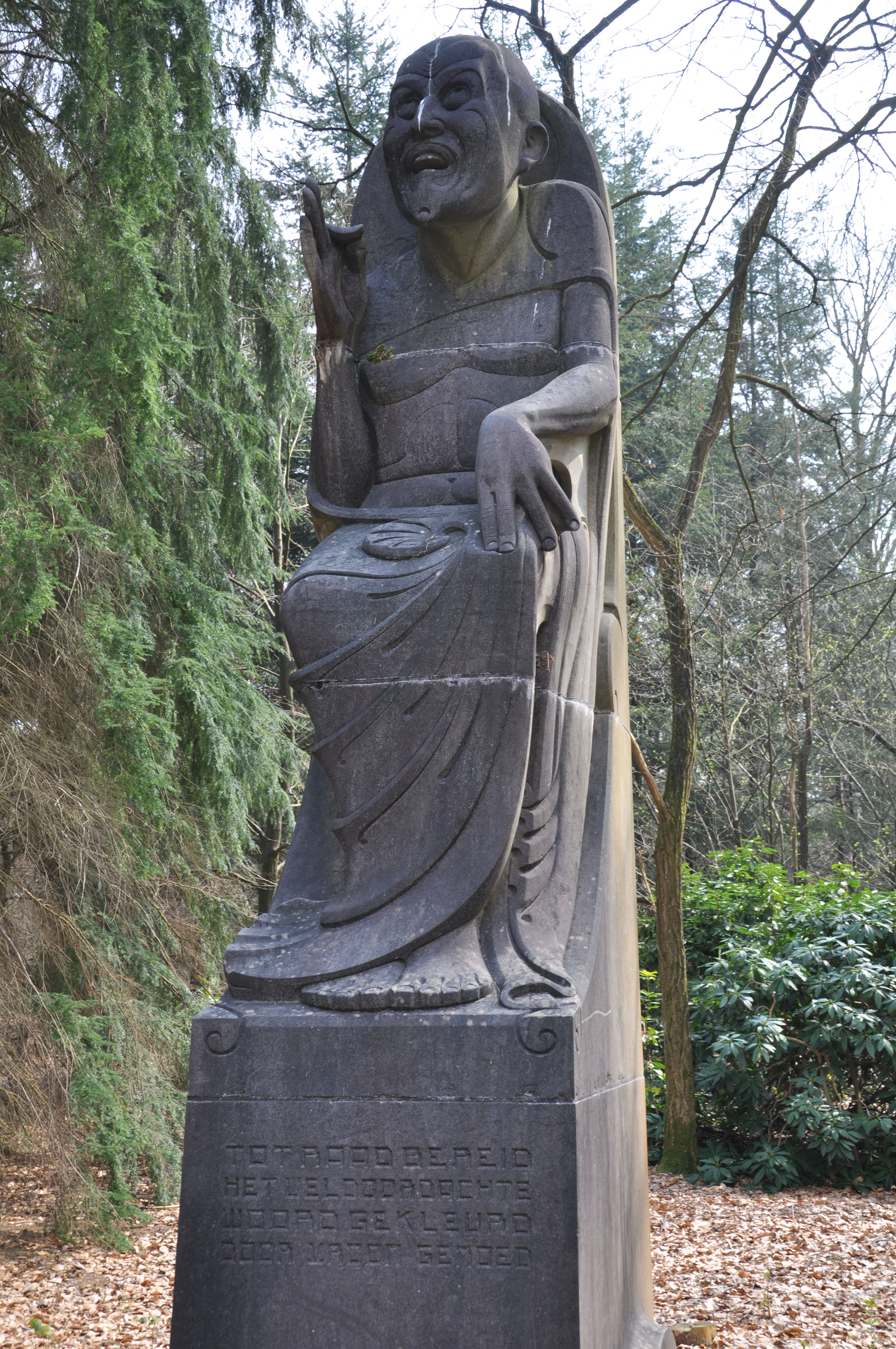 De philosoof van Joseph Mendes da Costa gemaakt tussen 1920 - 1924 in opdracht van mevrouw Kröller-Müller. Op het beeld staat de volgende tekst: "Tot raad bereid, het weldoordachte, woord gekleurd, door vroom gemoed".